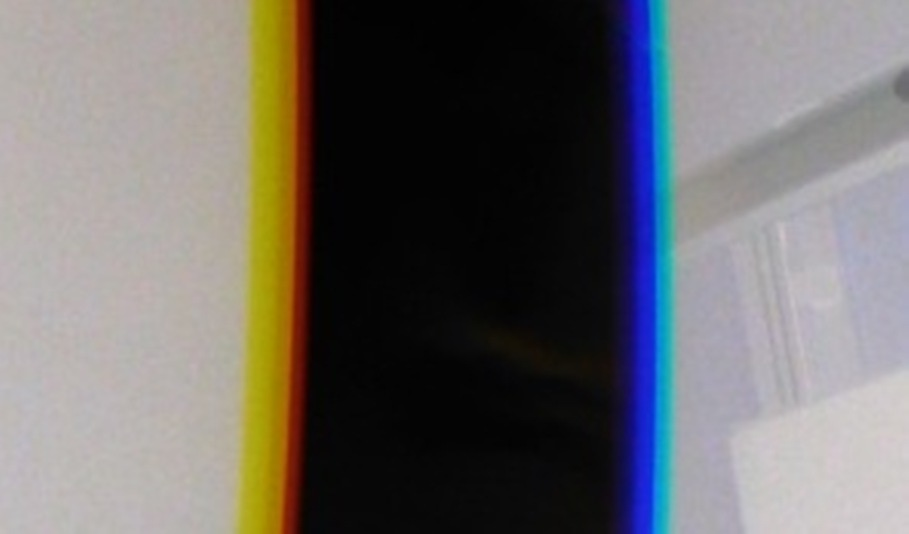 Una striscia nera vista attraverso un prisma di vetro, lungo i cui bordi compaiono delle strisce di colore